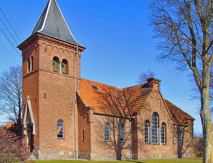 Buerup (Kalundborg) fra sydøst